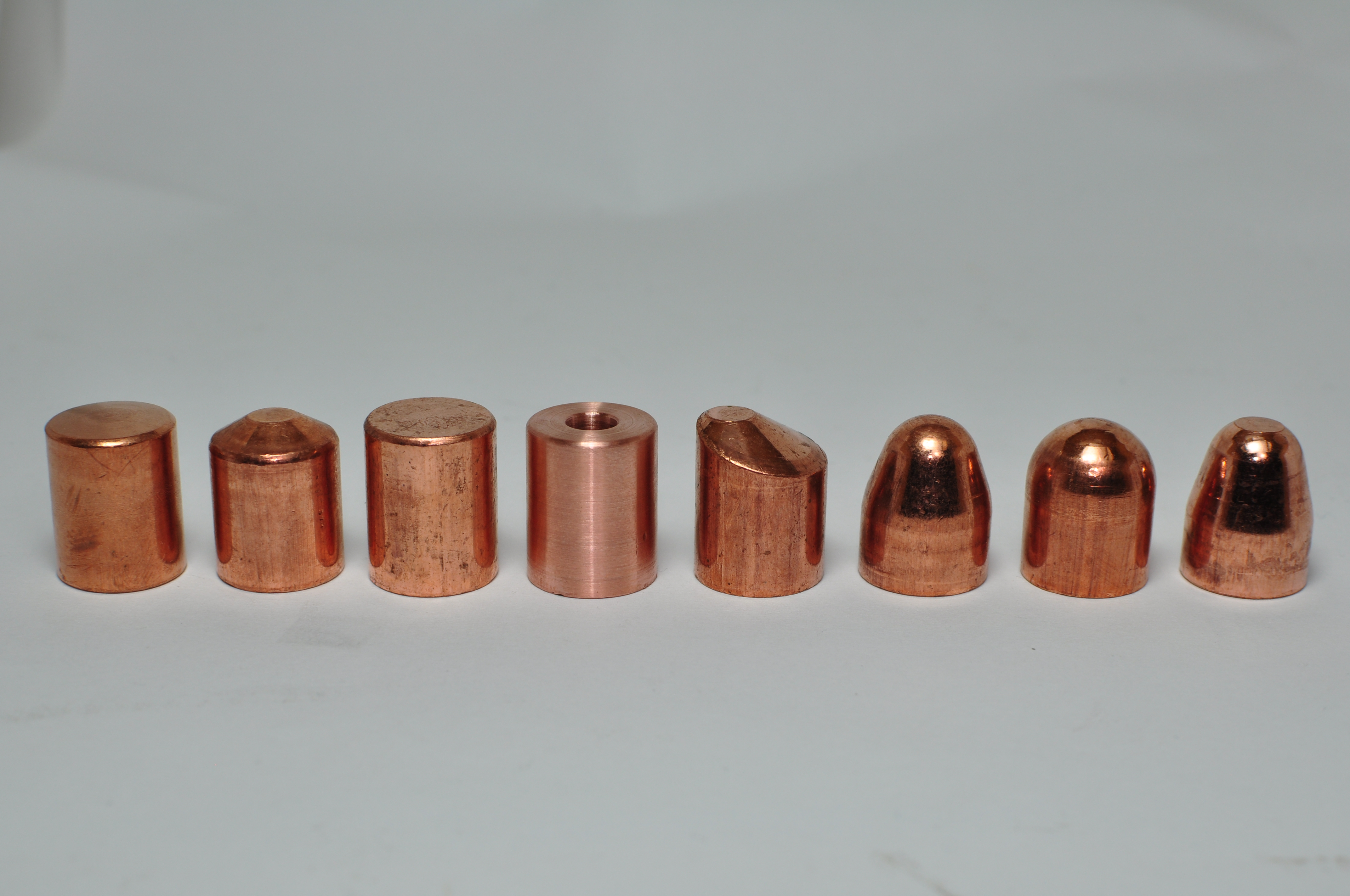 Elekródové špičky